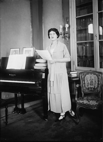 Alma Gluck (1884 - 1938), American soprano